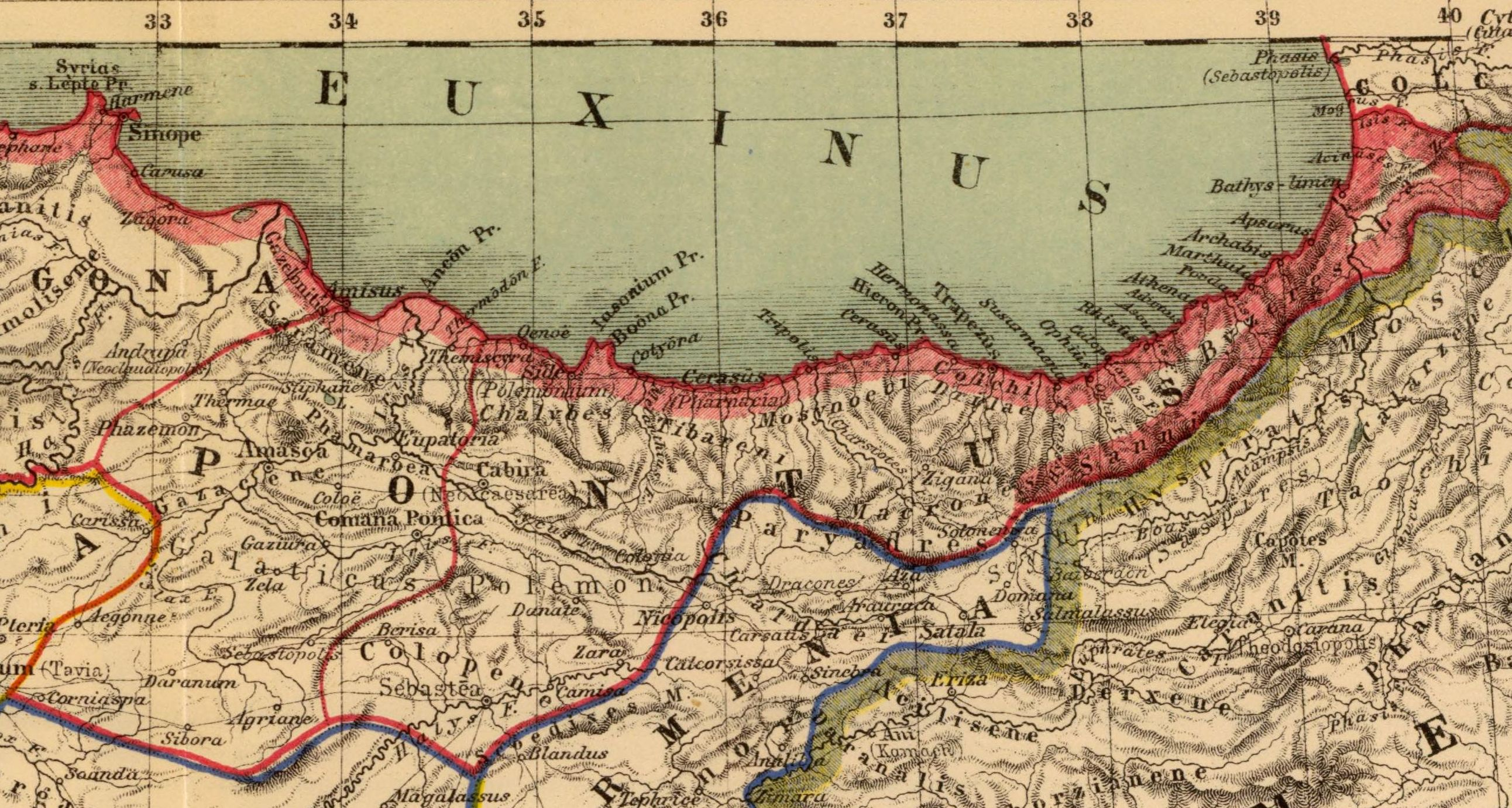 Pontus. Asia citerior. Auctore Henrico Kiepert Berolinensi. Geographische Verlagshandlung Dietrich Reimer (Ernst Vohsen) Berlin, Wilhemlstr. 29. (1903)